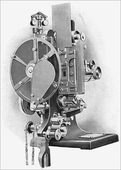 El proyector Kinemacolor utiliza una rueda de color giratoria para crear películas de color.